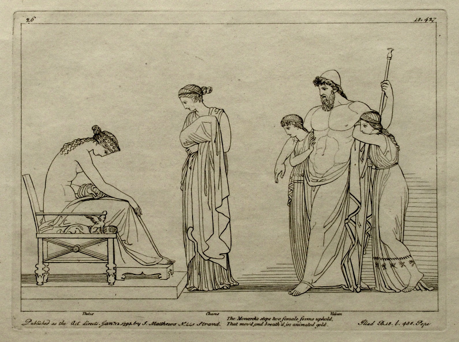 Kupferstich (1795) von Tommaso Piroli (1752 – 1824) nach einer Zeichnung (1793) von John Flaxman (1755 – 1826).